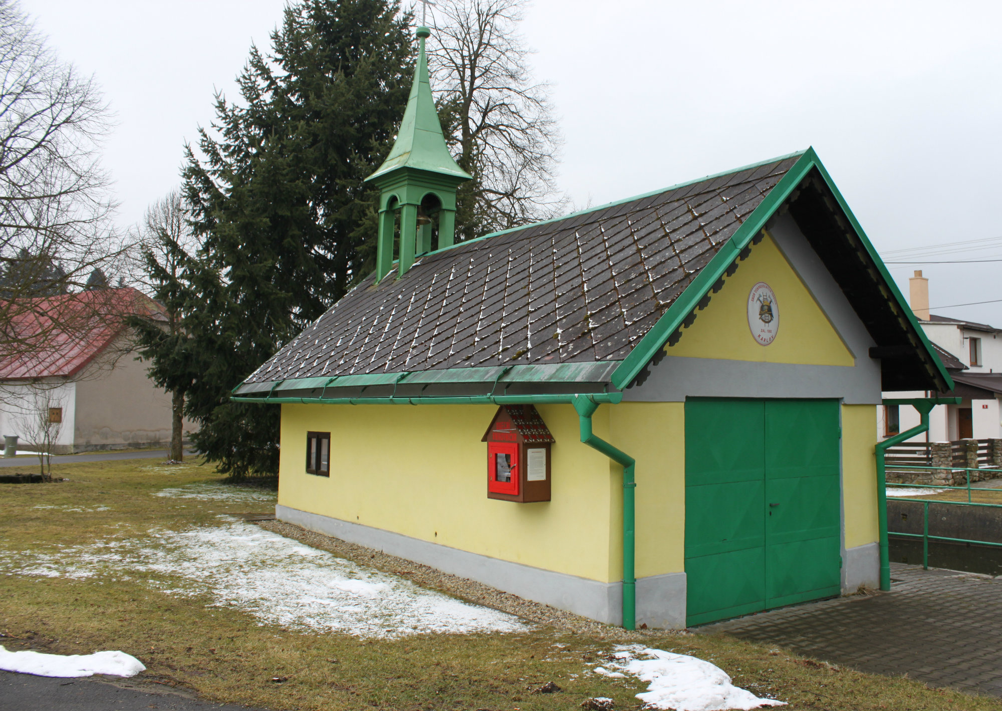 Hasičská zbrojnice na návsi